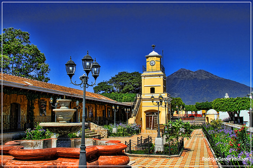 Vista desde el Tanque de Ciudad Vieja.